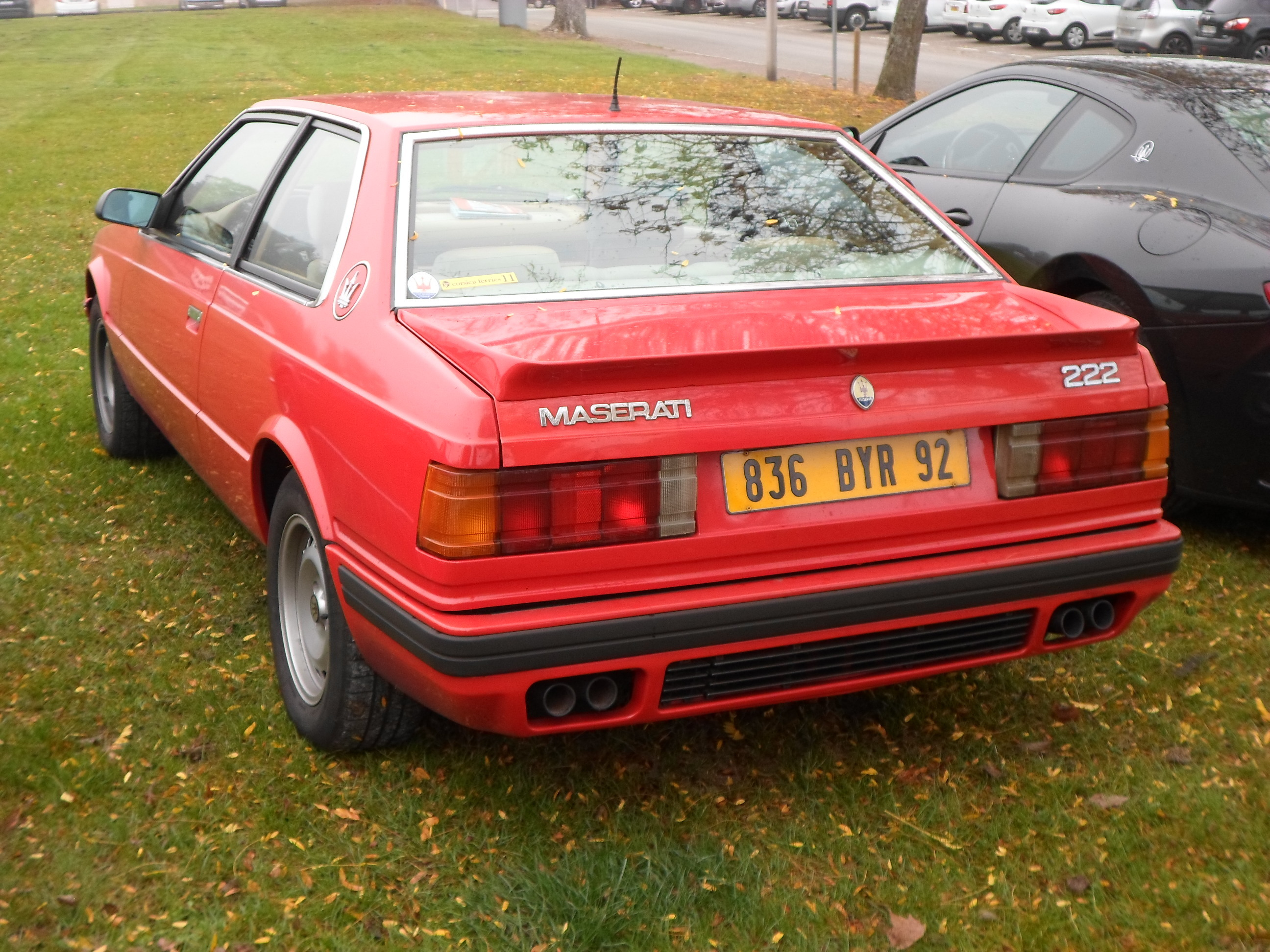 Maserati 222 en 2017